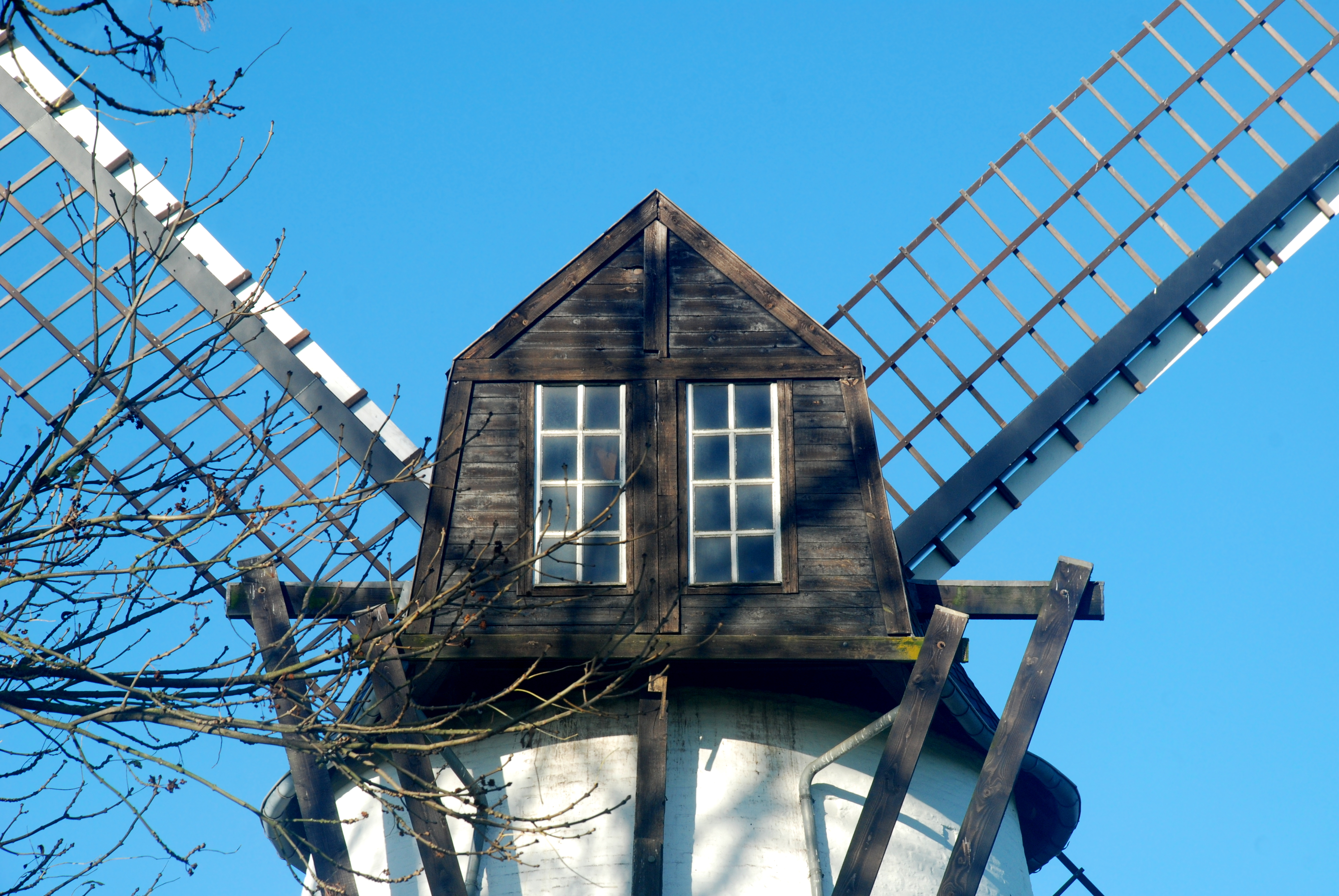 Belgique - Brabant wallon - Incourt - Opprebais - Moulin Gustot